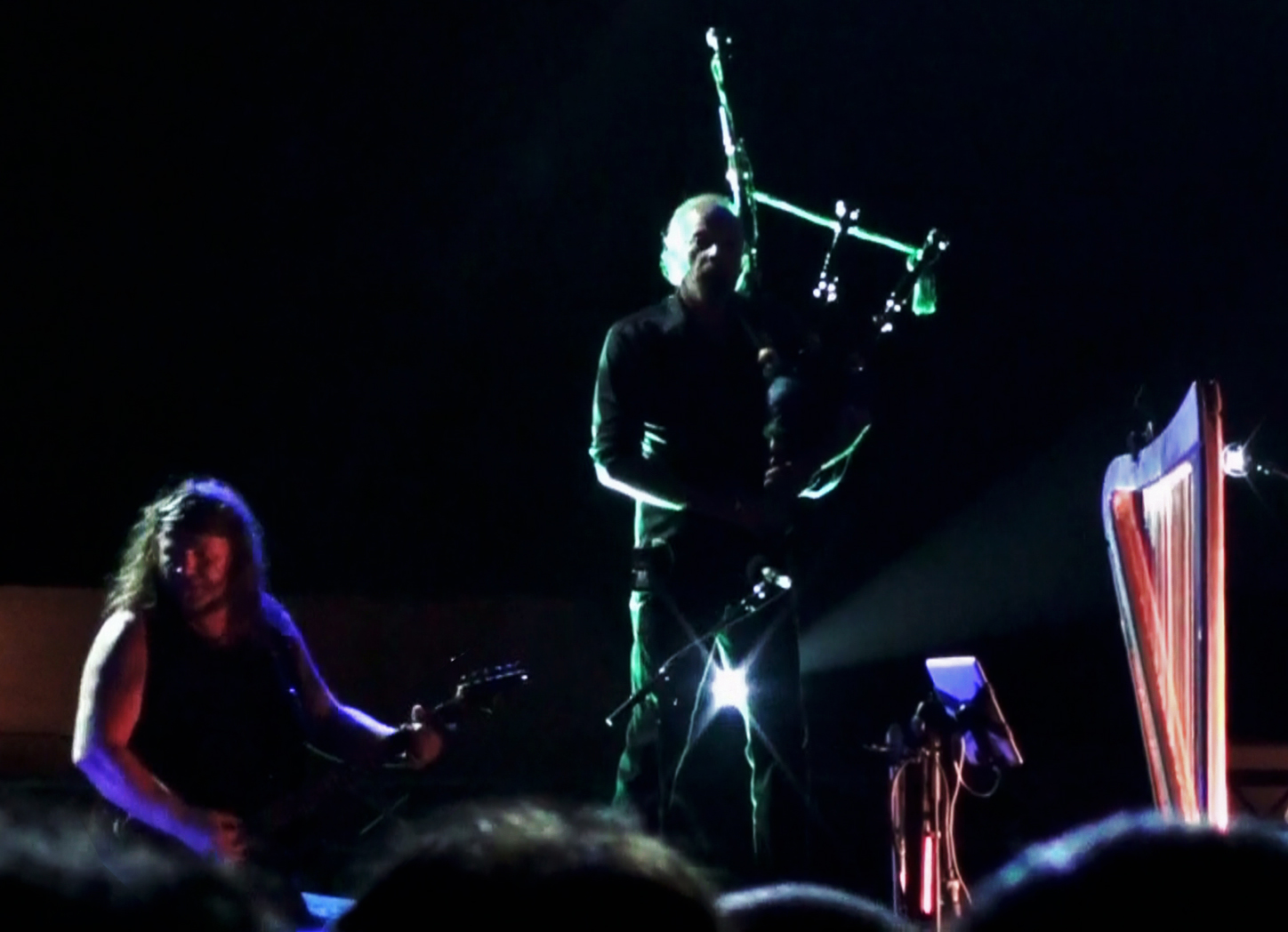 Pat O'May était l'invité d'Alan Stivell au festival des filets bleus le 16 août 2012.